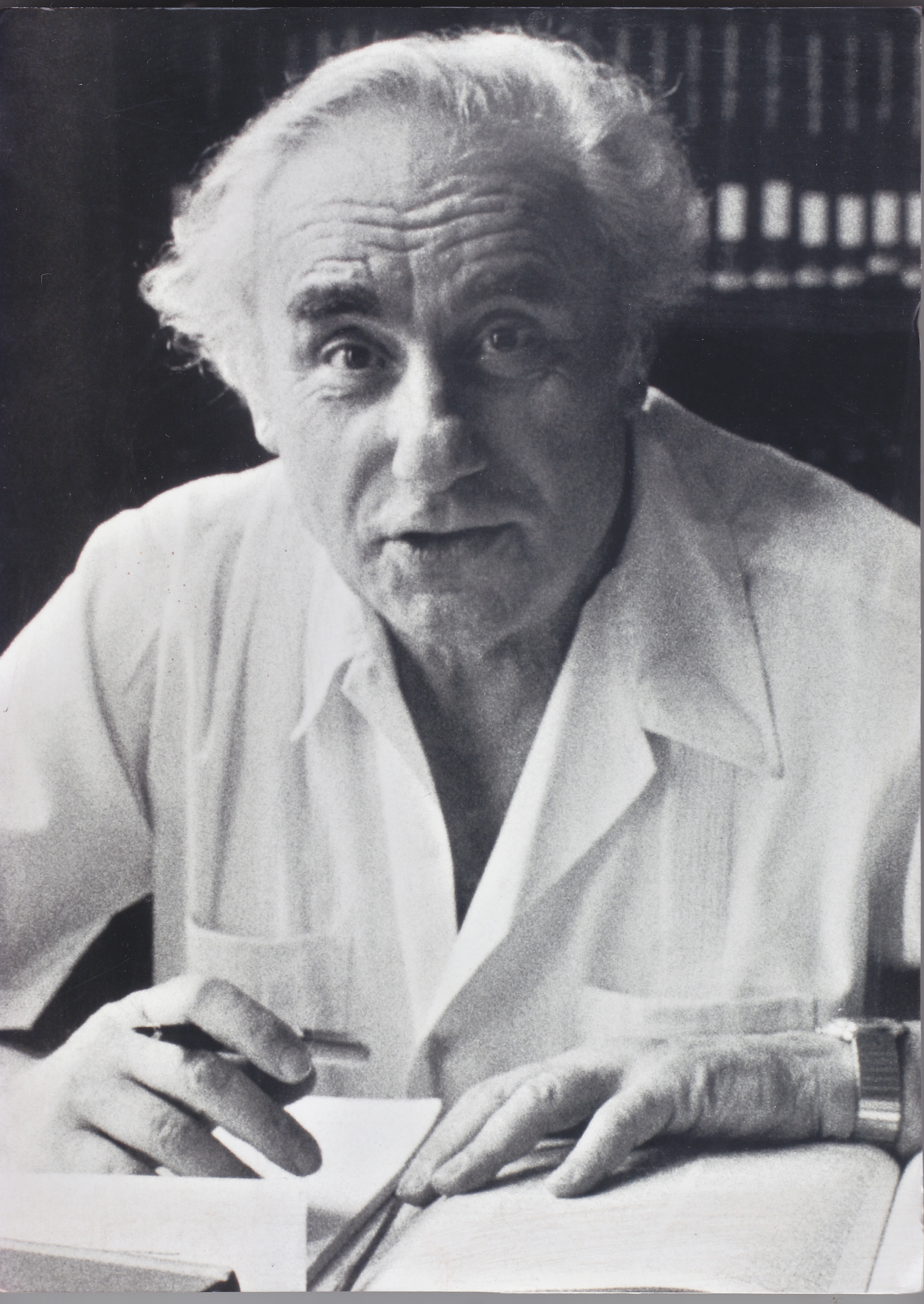 צבי בכרך